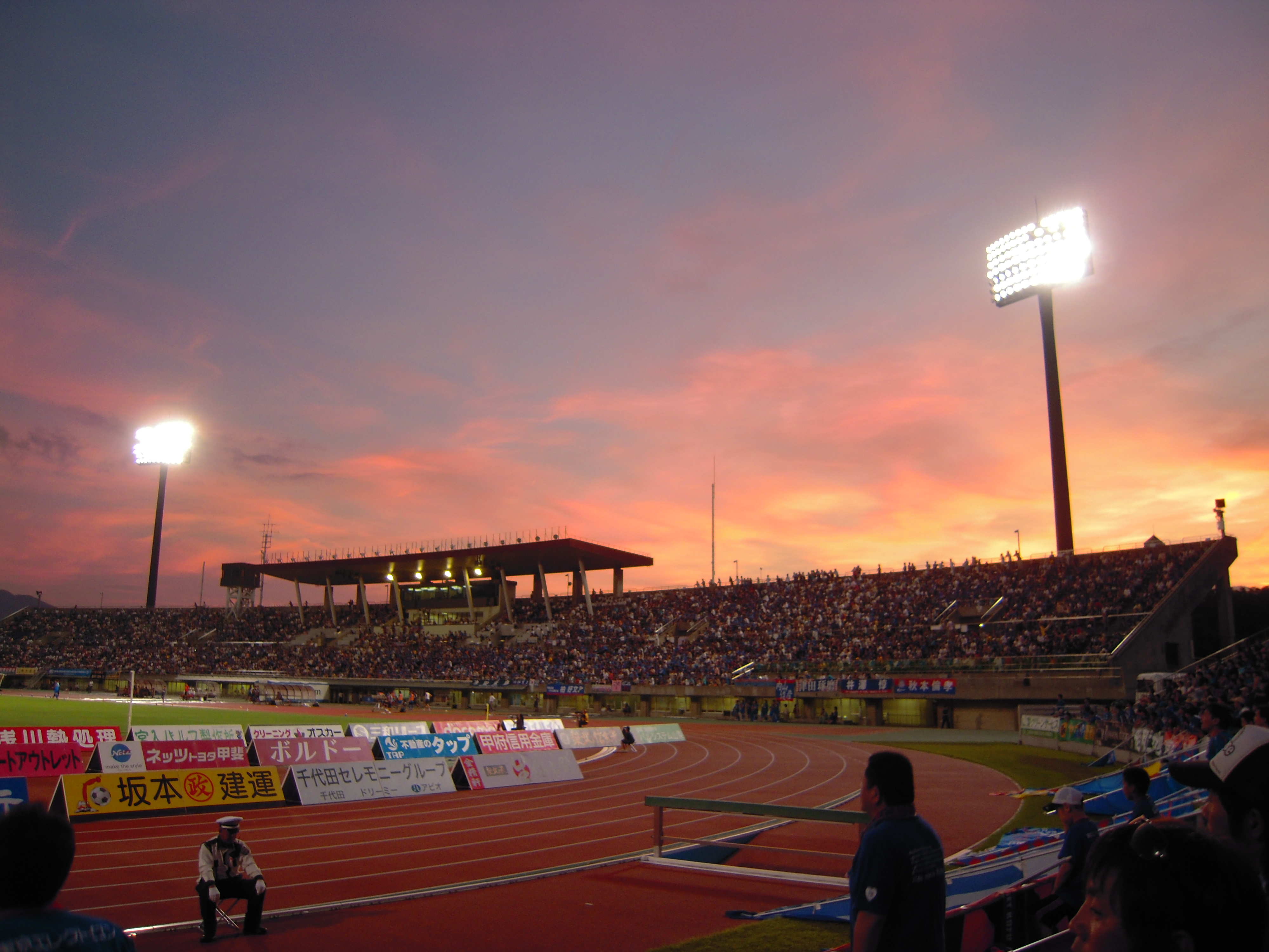 山梨中銀スタジアム (Yamanashi chuo bank stadium)